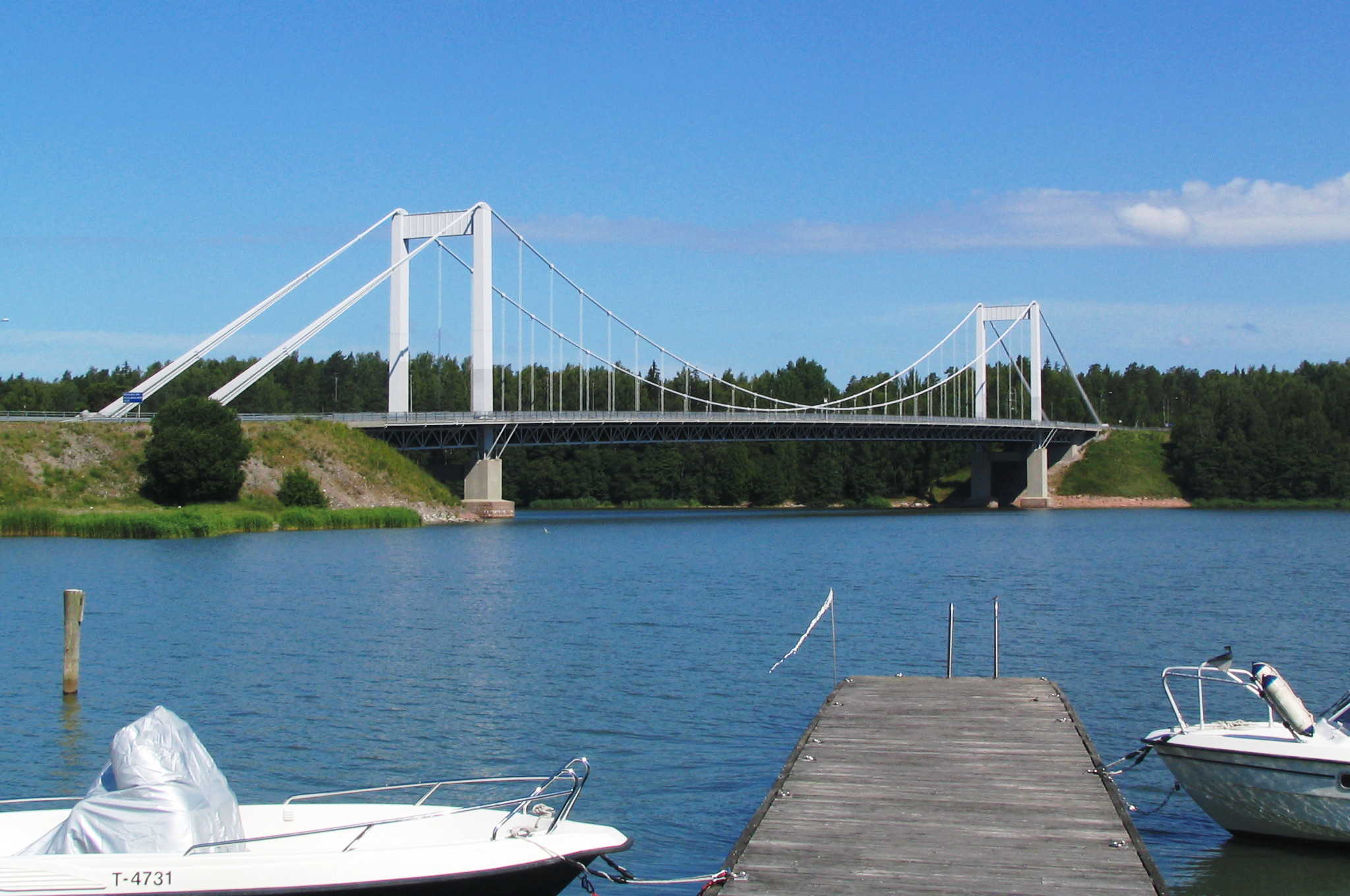 Kirjalansalmen silta kuvattuna Kirjalansaaresta. Edustalla laituri ja kaksi venettä.